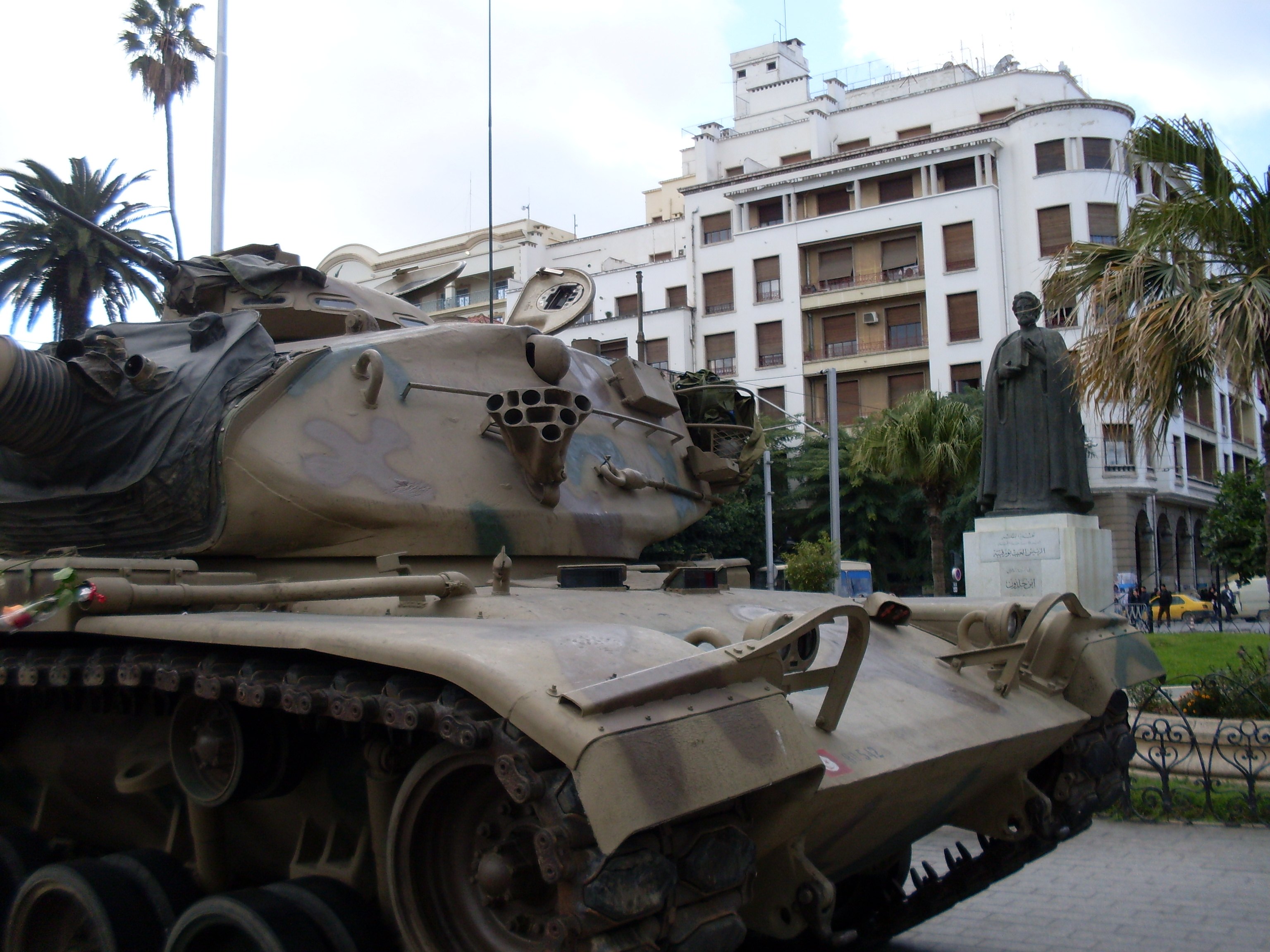 Char militaire posté devant la statue d'ibn Khaldoun à la place de l'indépendance à Tunis lors de la révolution dite des Jasmins